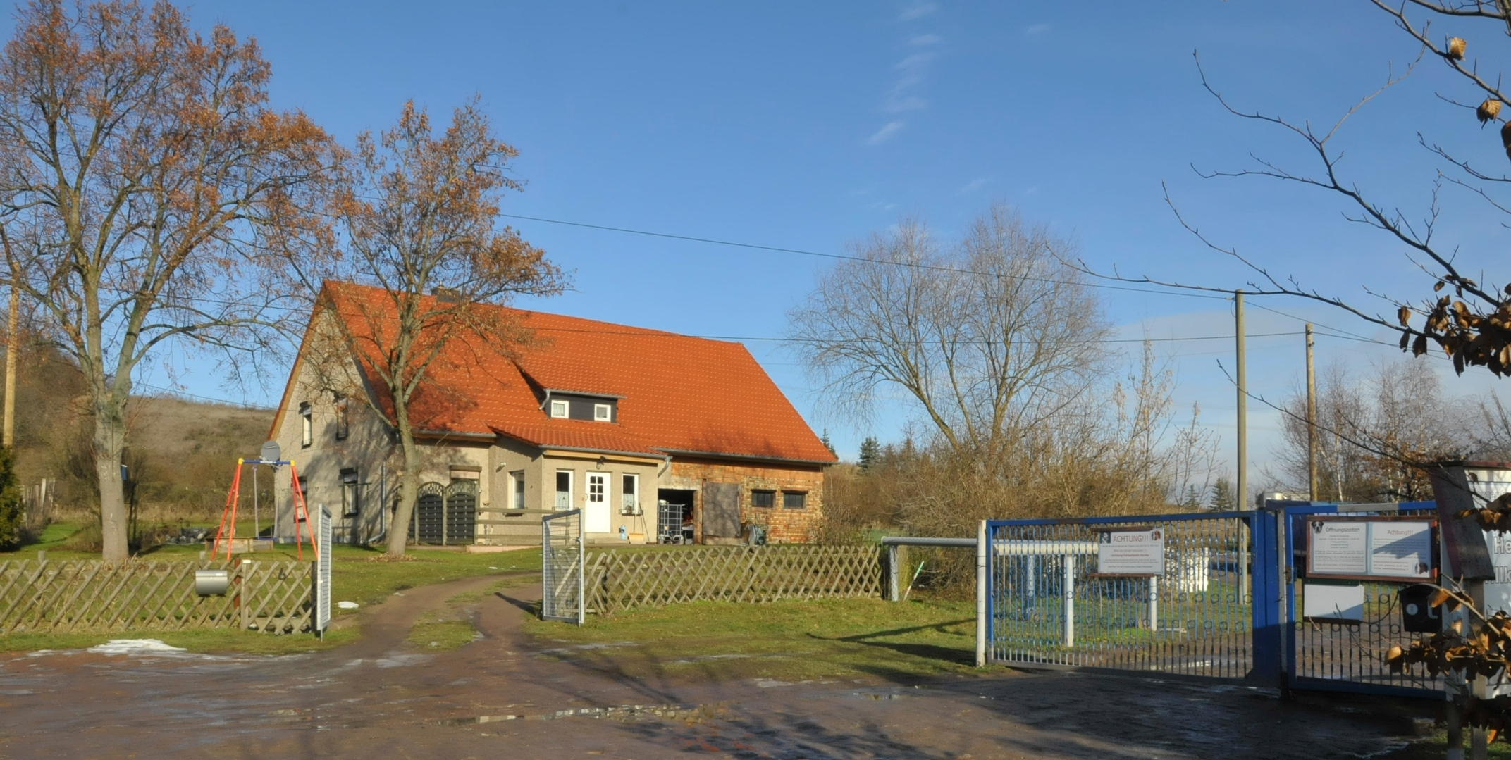 Weißenburg (Sömmerda), Gehöft